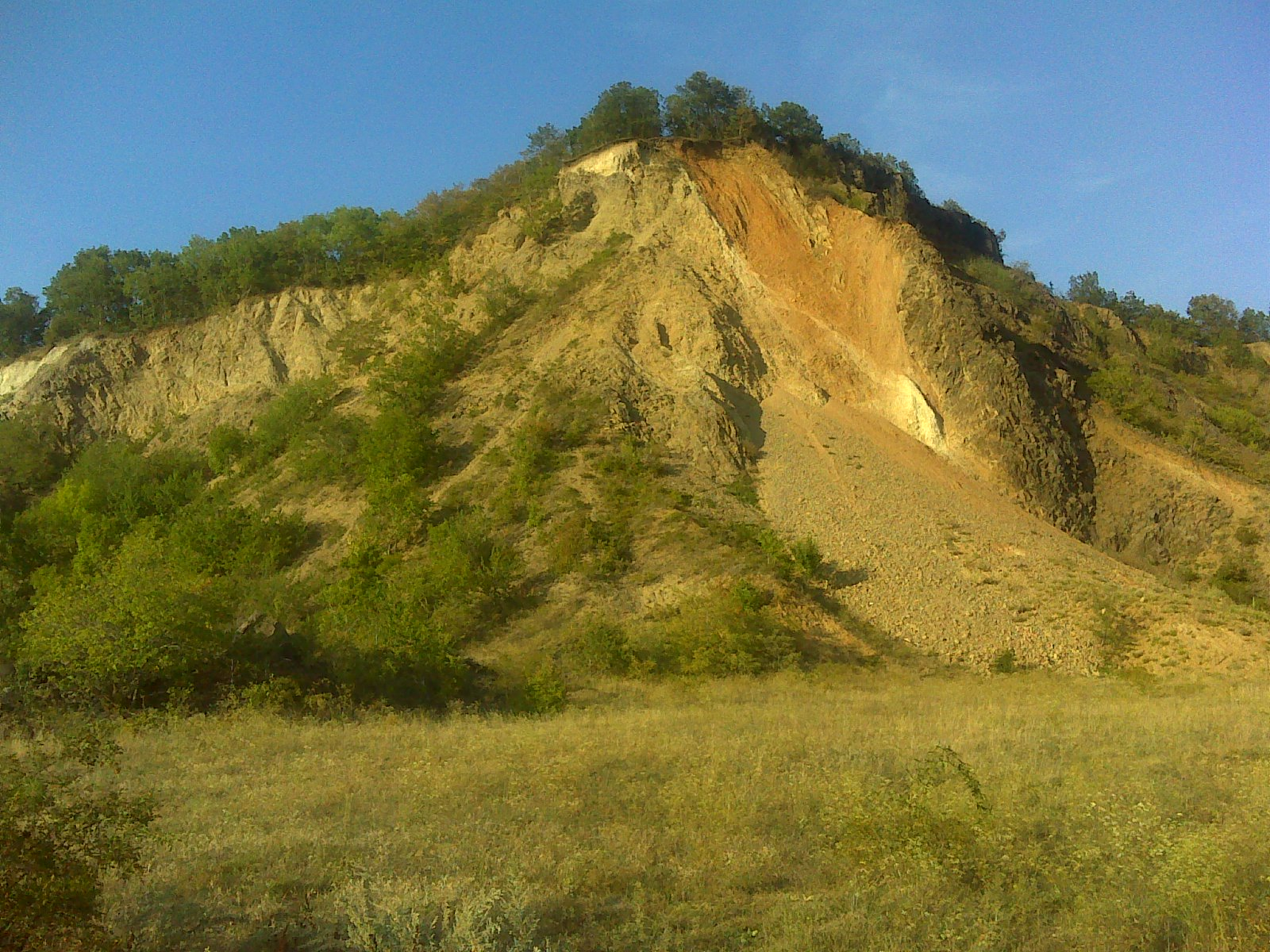 Nógrádkövesd kőbánya